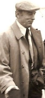 Arrivée à Bourges d'Yves Montand avant le récital qu'il donnera au Printemps de Bourges (avril 1982).